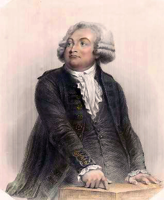 Mirabeau, député du Tiers État